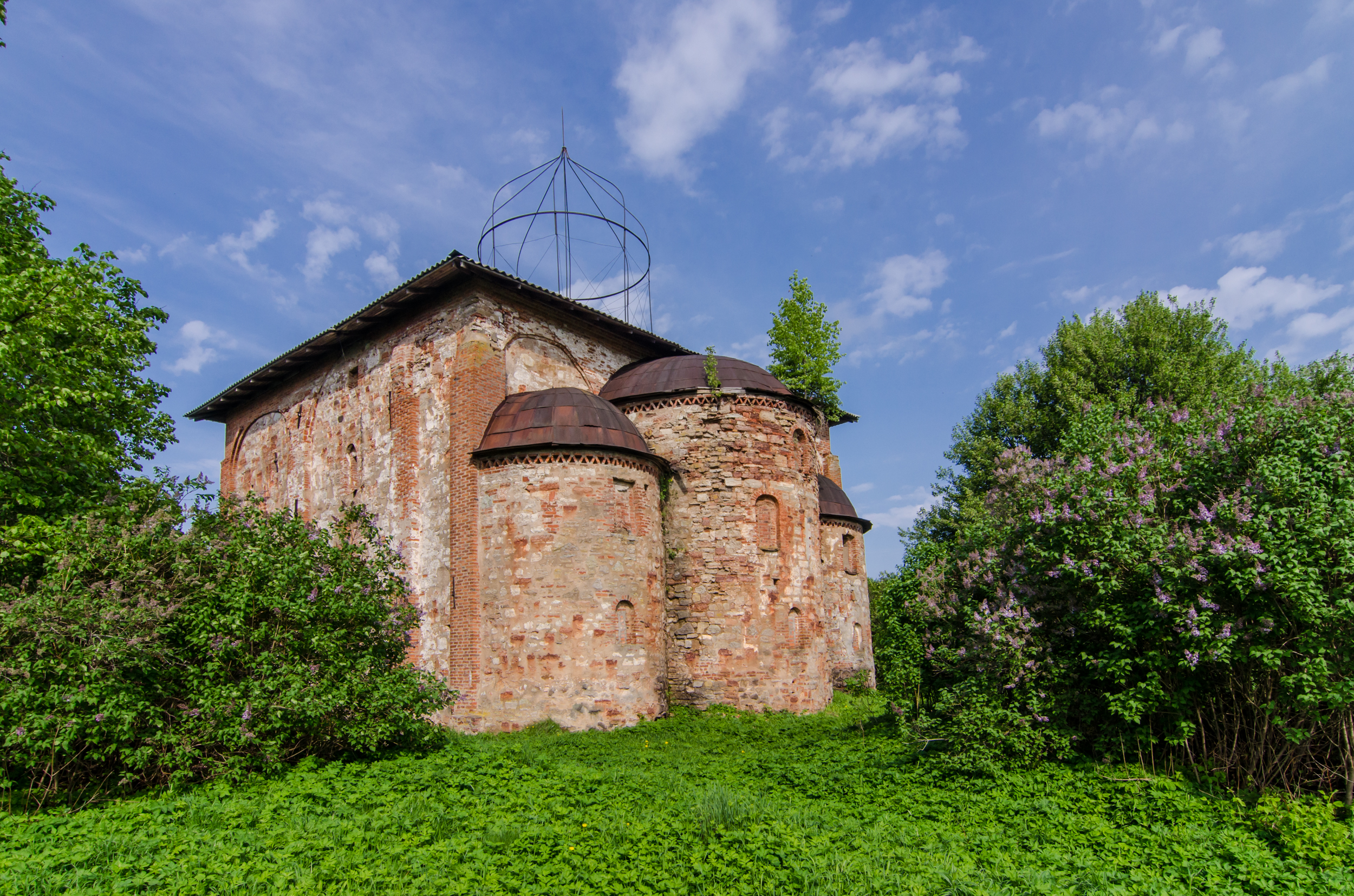 Церковь Воскресения Христова на Мячине (Уверения Апостола Фомы): Воскресенская слобода, Великий Новгород, Новгородская область